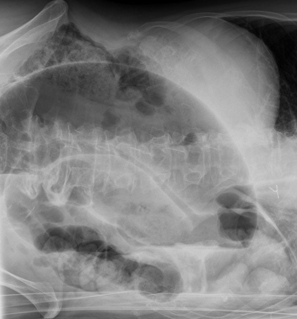 Kaffeebohnenzeichen (engl. coffee-bean sign) bei Sigmavolvulus in der Röntgenaufnahme in linker Seitenlage.